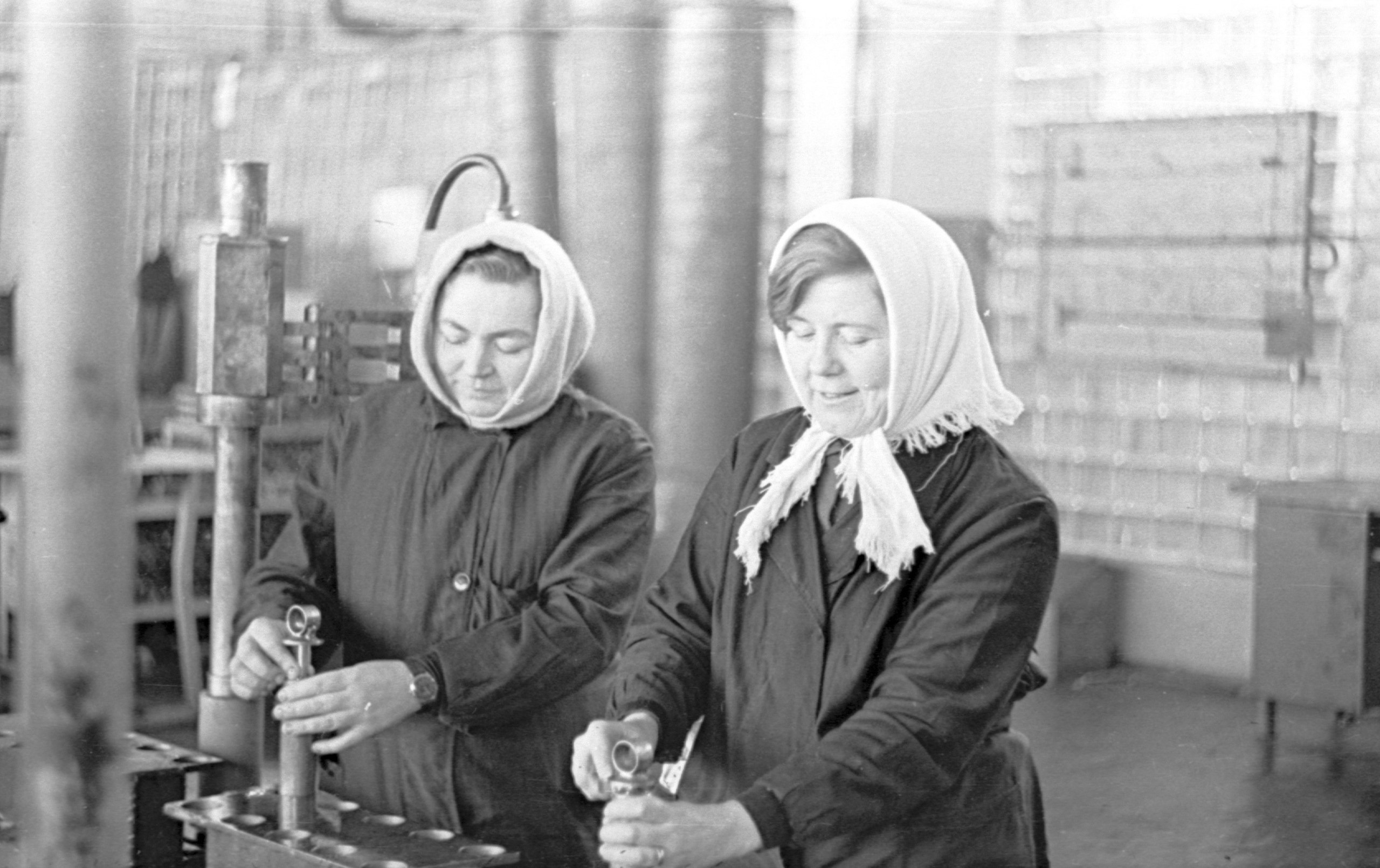 Из истории Скопинского автоагрегатного завода